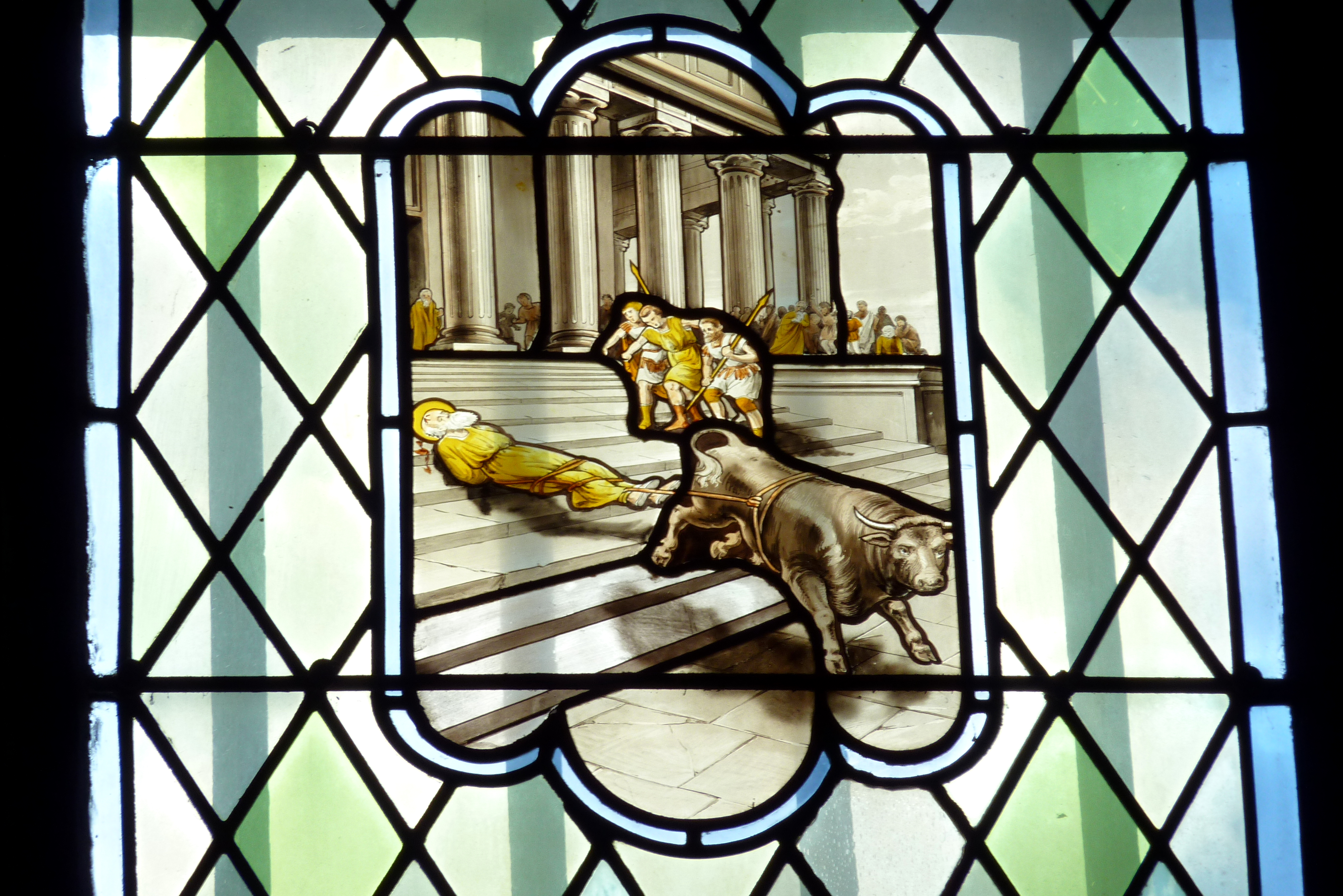 Bleiglasfenster in der katholischen Pfarrkirche Saint-Saturnin in Antony, Darstellung: der hl. Saturninus von Toulouse wird an einen Stier gebunden und zu Tode geschleift (siehe [1])